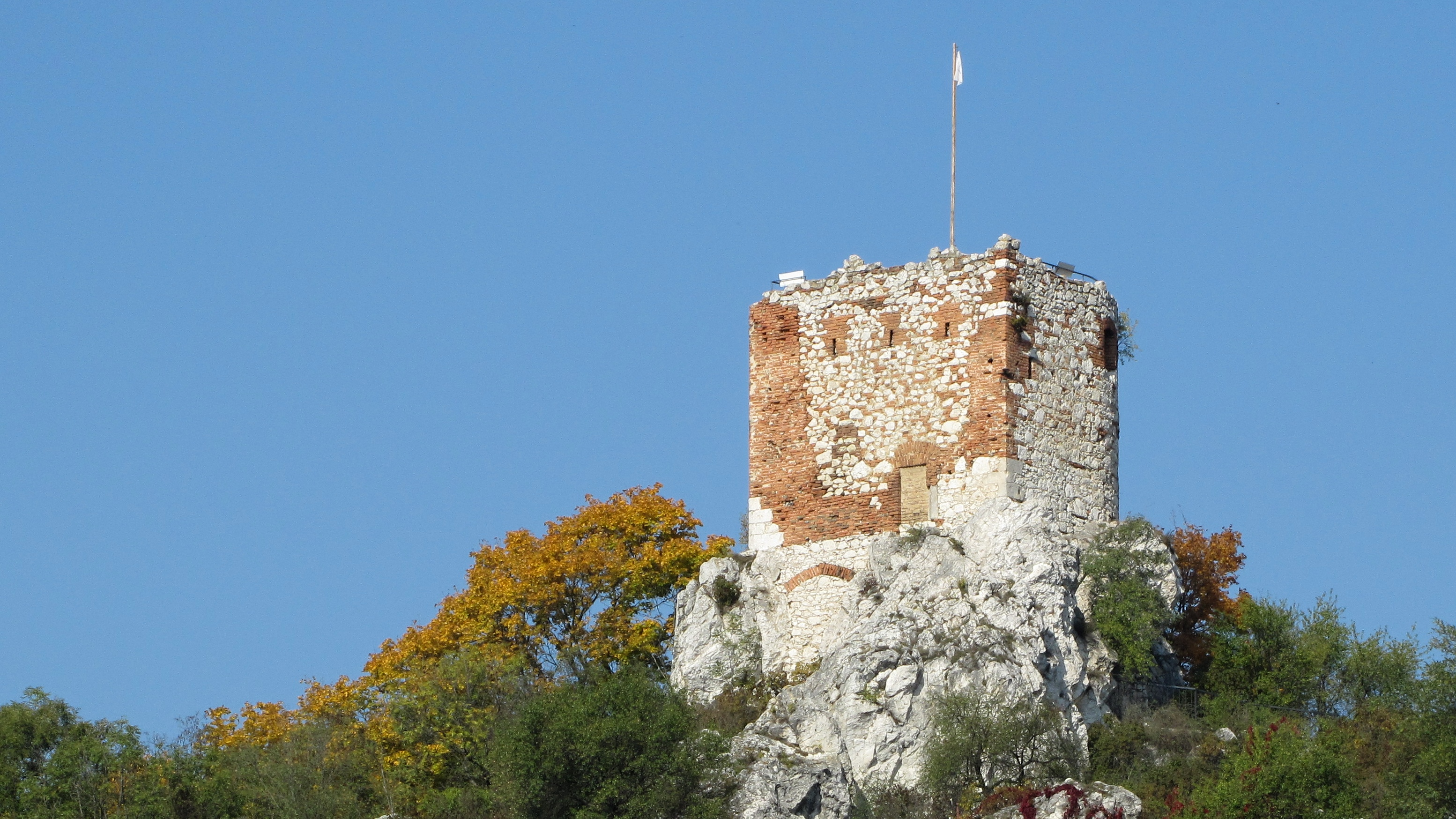 Kozí hrádek v Mikulově